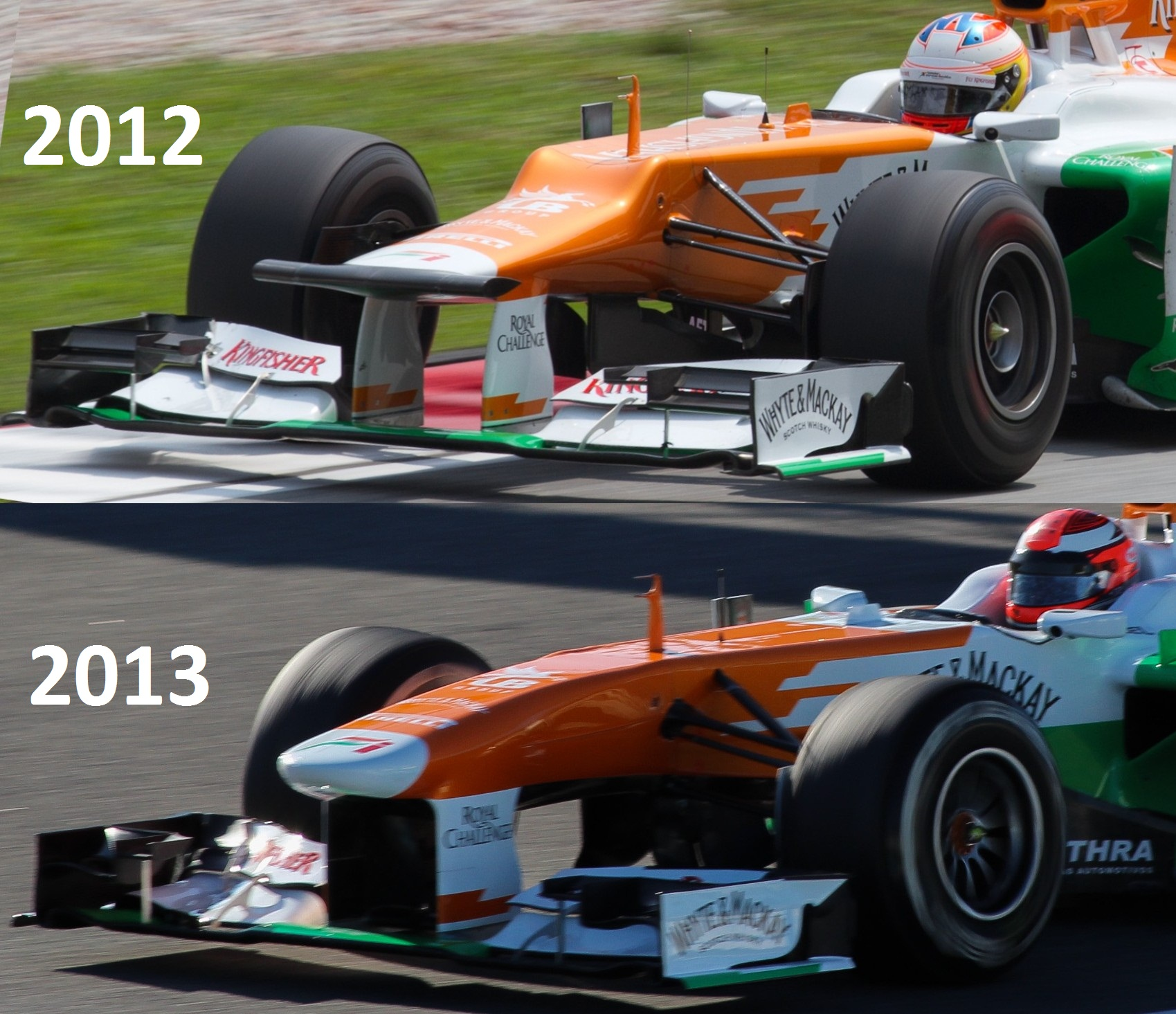 F1 Force India nose 2012-2013